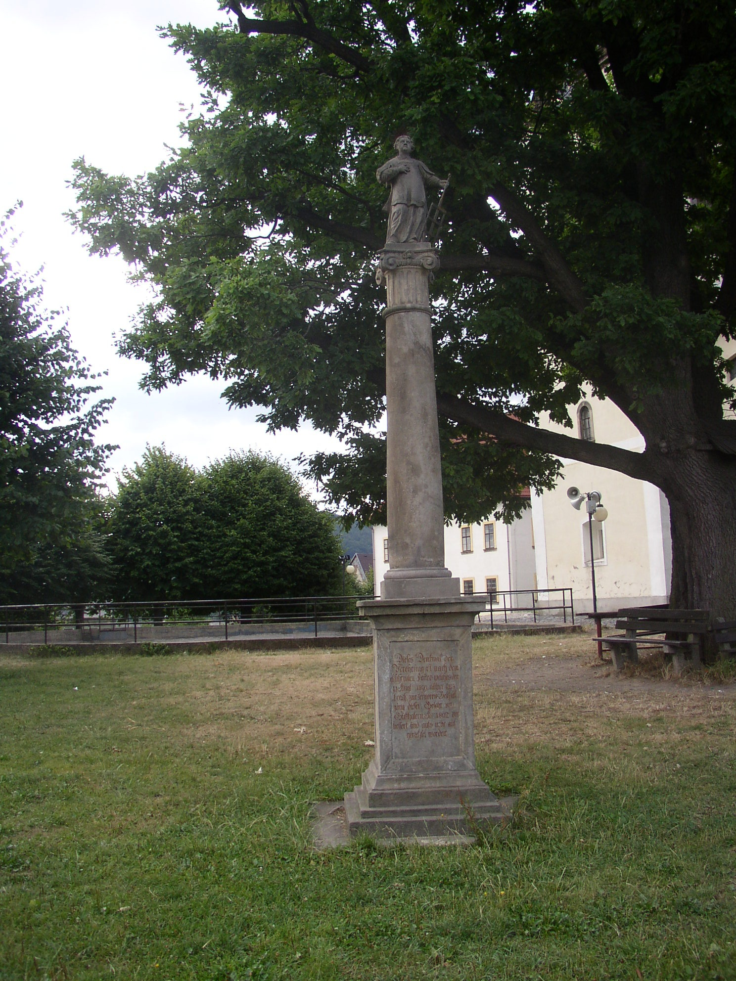 Jiřetín pod Jedlovou, okres Děčín, Česká republika. Sloup sv. Vavřince z roku 1716.